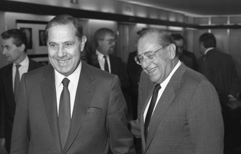 15.10.1987 Bundesminister Dr. Friedrich Zimmermann empfängt den französischen Innenminister Charles Pasqua, im Bundesministerium des Innern